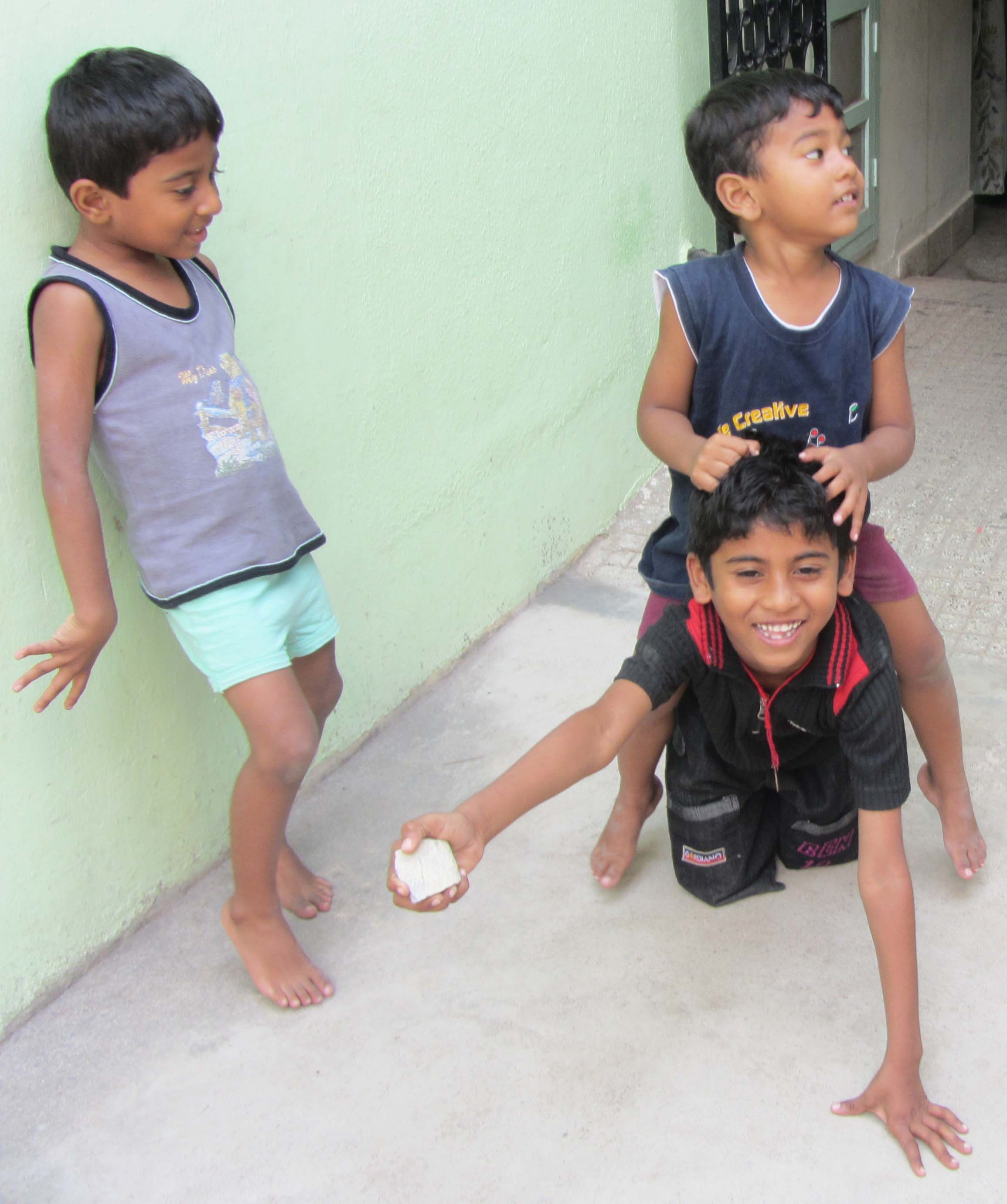 own shot - குதிரைச்சில்லி விளையாட்டில் குதிரை சில்லால் அடித்தல்.